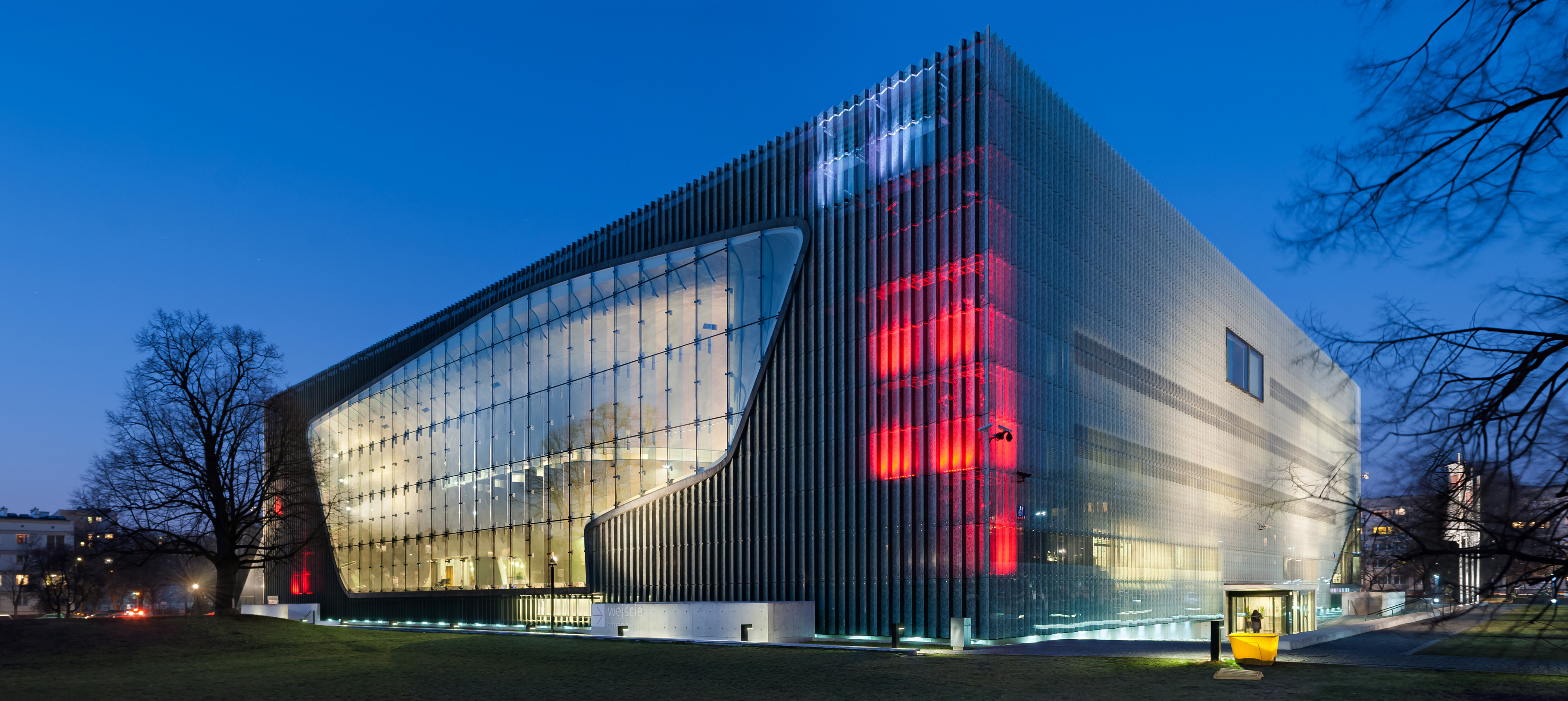 Gmach Muzeum Historii Żydów Polskich POLIN w Warszawie widziany od strony ulic Mordechaja Anielewicza i Karmelickiej